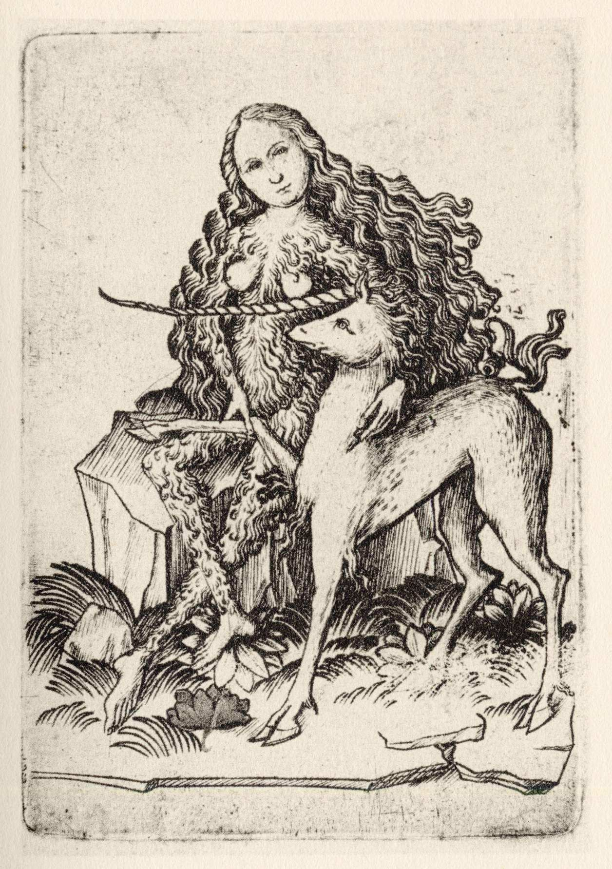 Tier-Dame, Das kleine Kartenspiel, Kupferstich ; Animal-Queen, The smal pack of cards, etching, L.229